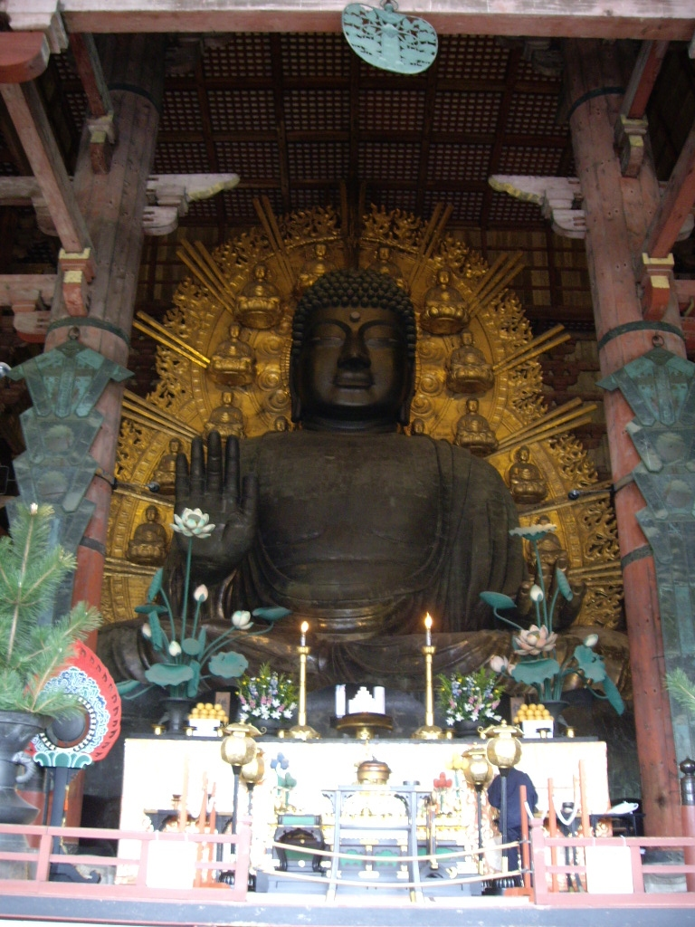 東大寺盧舎那大仏。東大寺盧舍那大佛。Todaiji Daibutsu.